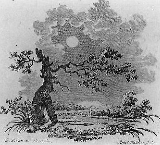 Gravure voor bij het werk Fanny van Rhijnvis Feith